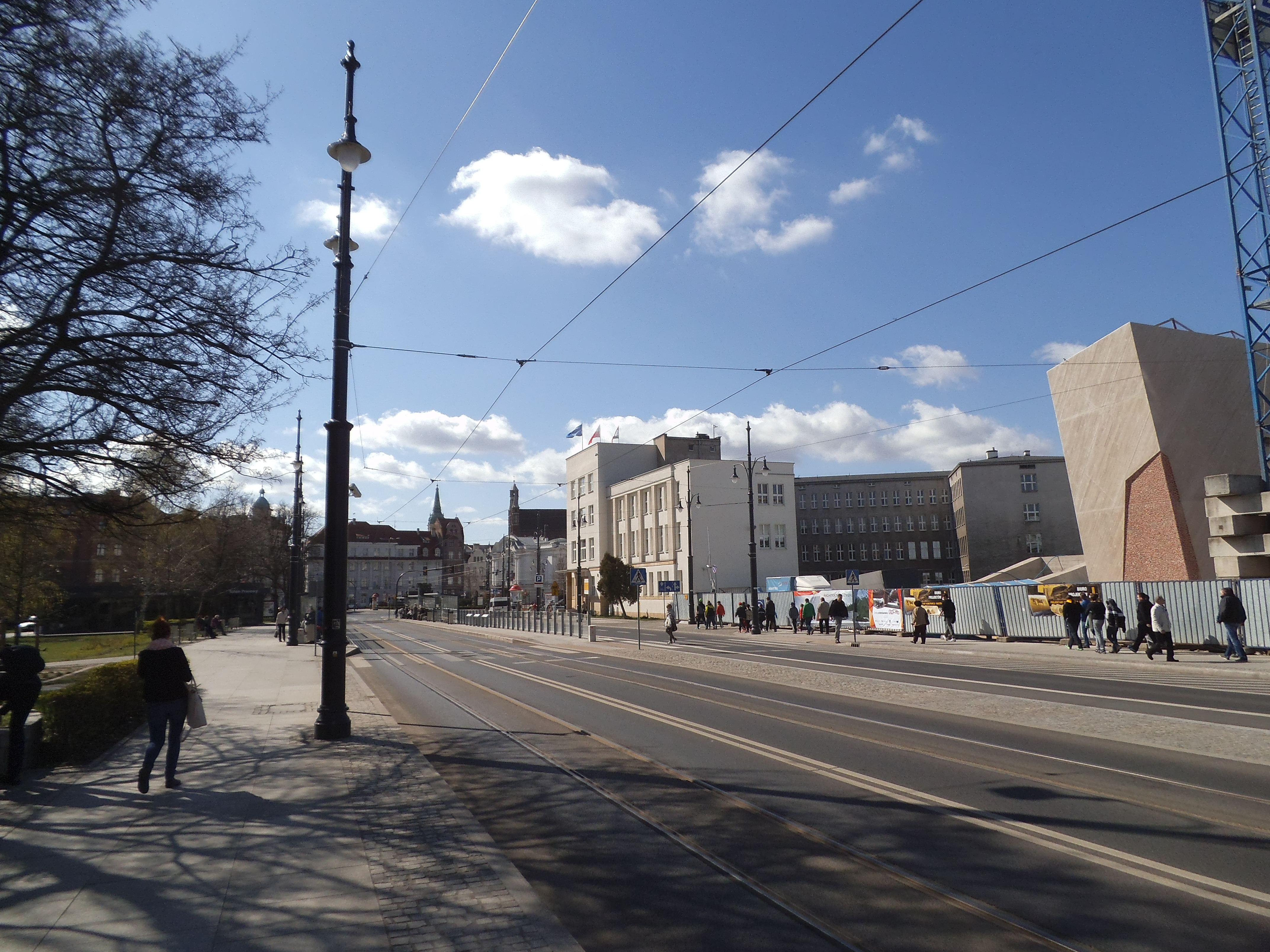 Aleja Solidarności w Toruniu